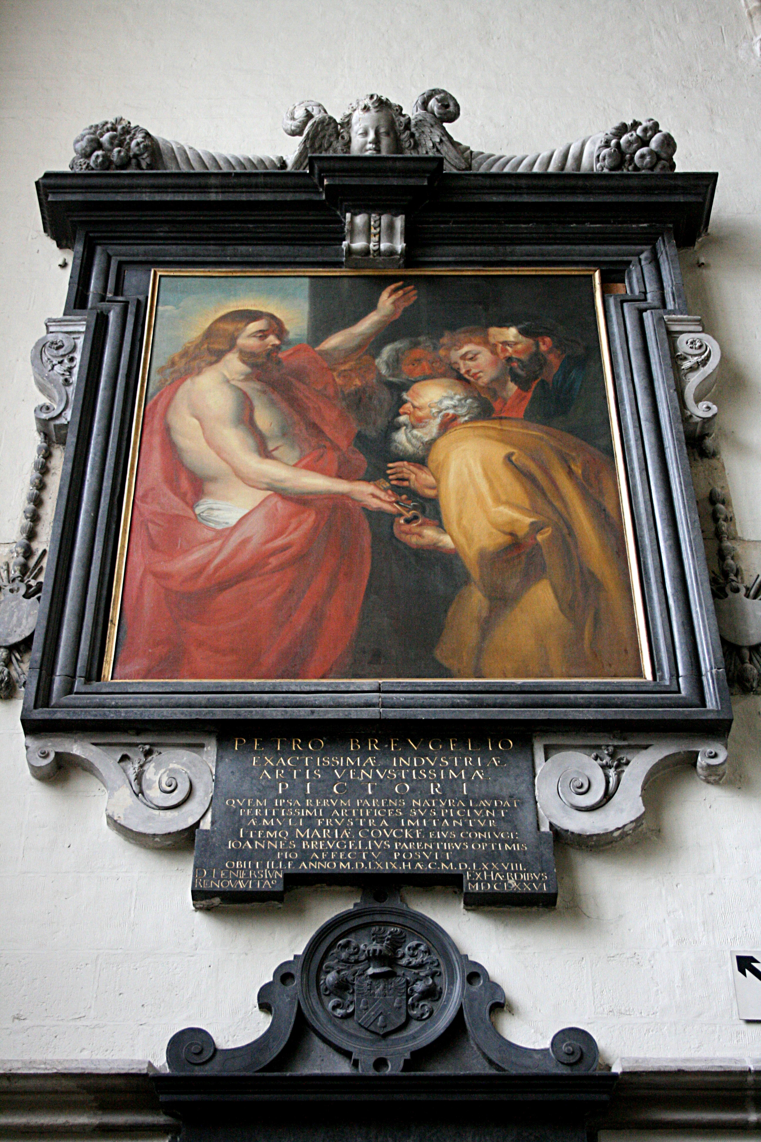 Notre-Dame de la Chapelle, Place de la Chapelle, Bruxelles (Belgique). Troisème chapelle du collatéral droit. Epitaphe en marbre (1676) à la mémoire de Pieter Bruegel l'Ancien (1525-1569) et de son épouse par David Teniers III. Copie d'une toile de Rubens représentant le Christ remettant les clefs à Saint-Pierre.